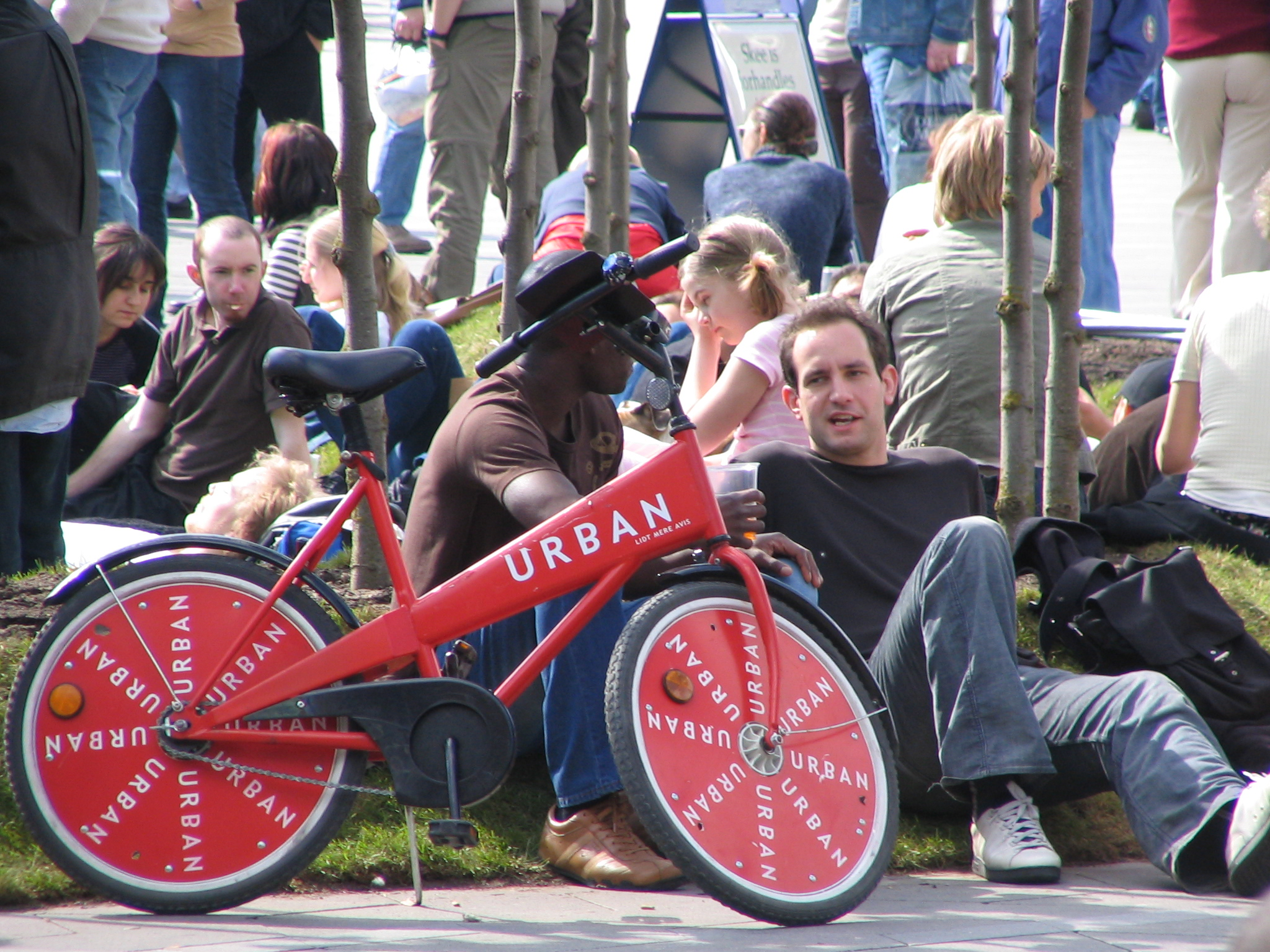 Kostenlos leihbare Citybike in Kopenhagen